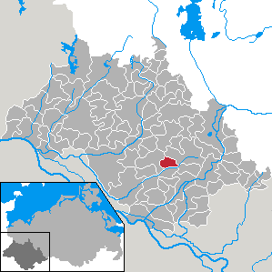 Göhlen in Mecklenburg-Vorpommern - district Ludwigslust